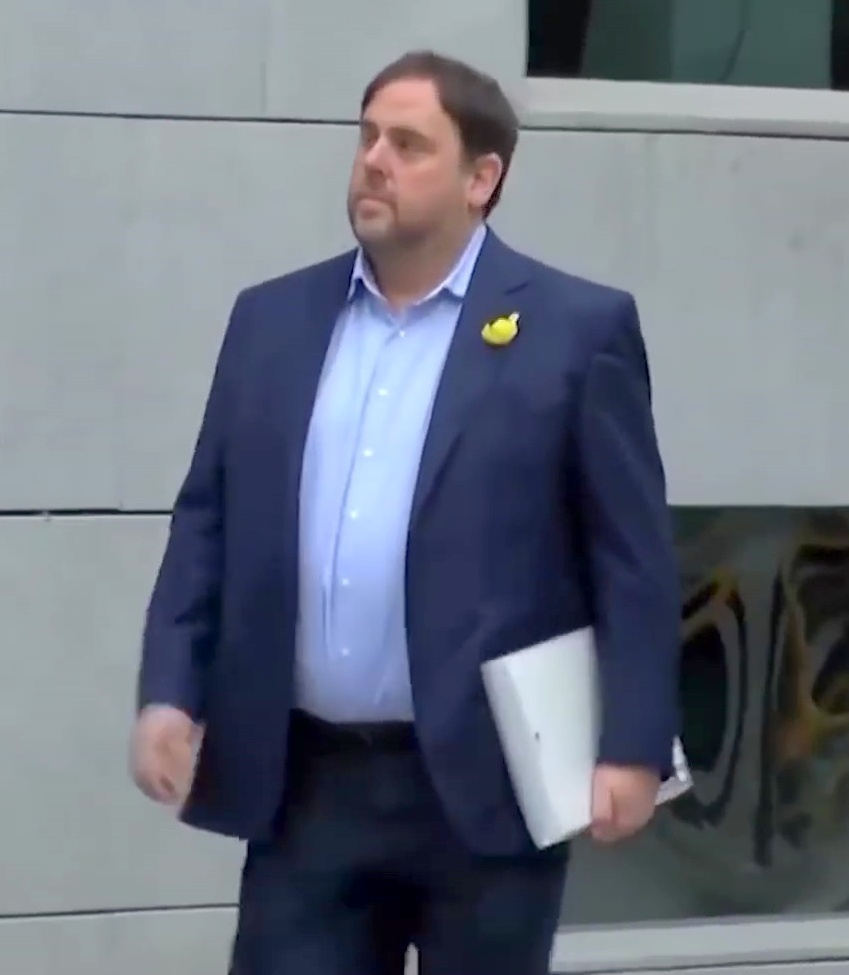 La jueza de la Audiencia Nacional Carmen Lamela ha acordado enviar a prisión sin fianza a Oriol Junqueras y a otros siete consellers que han comparecido este jueves, acusados de rebelión, sedición y malversación de fondos públicos.